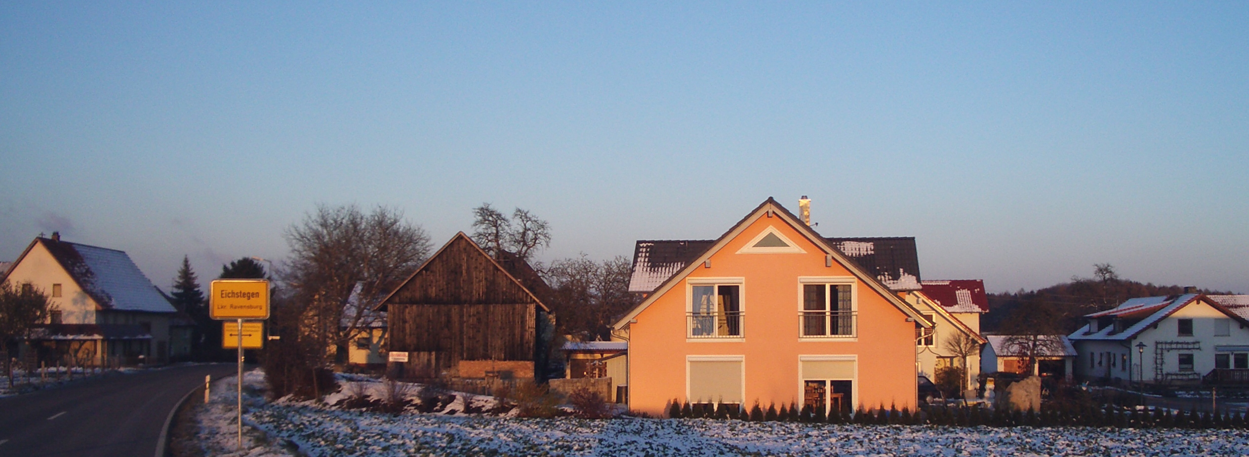 Eichstegen, Landkreis Ravensburg, Germany